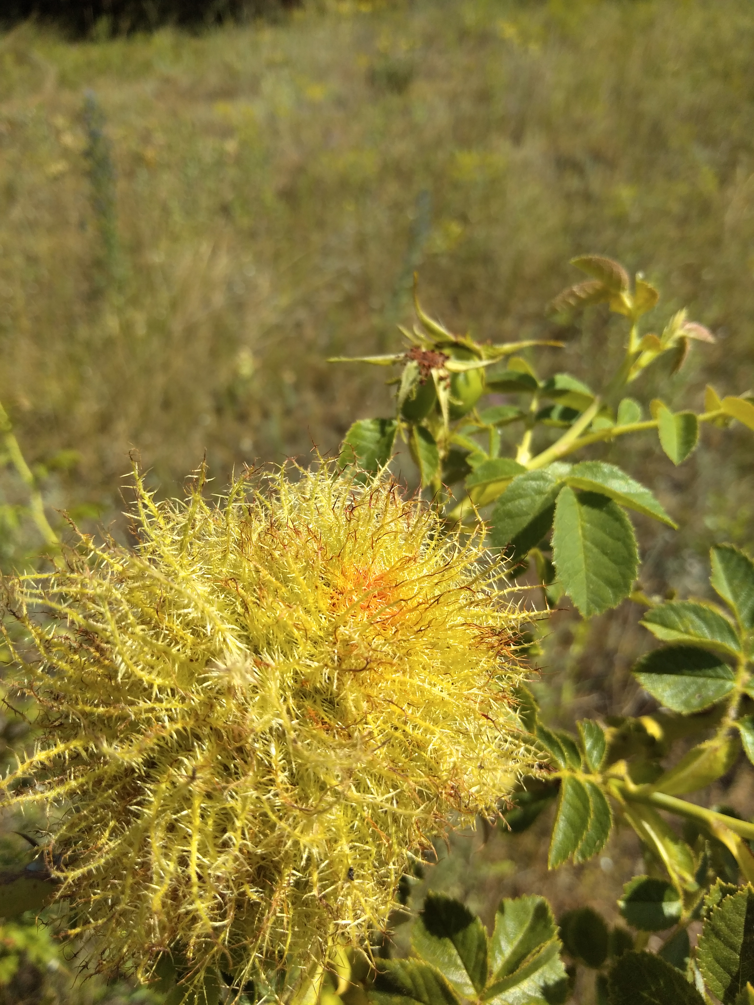 Знято смартфоном в степу на півдні України. Хвороба шипшини.